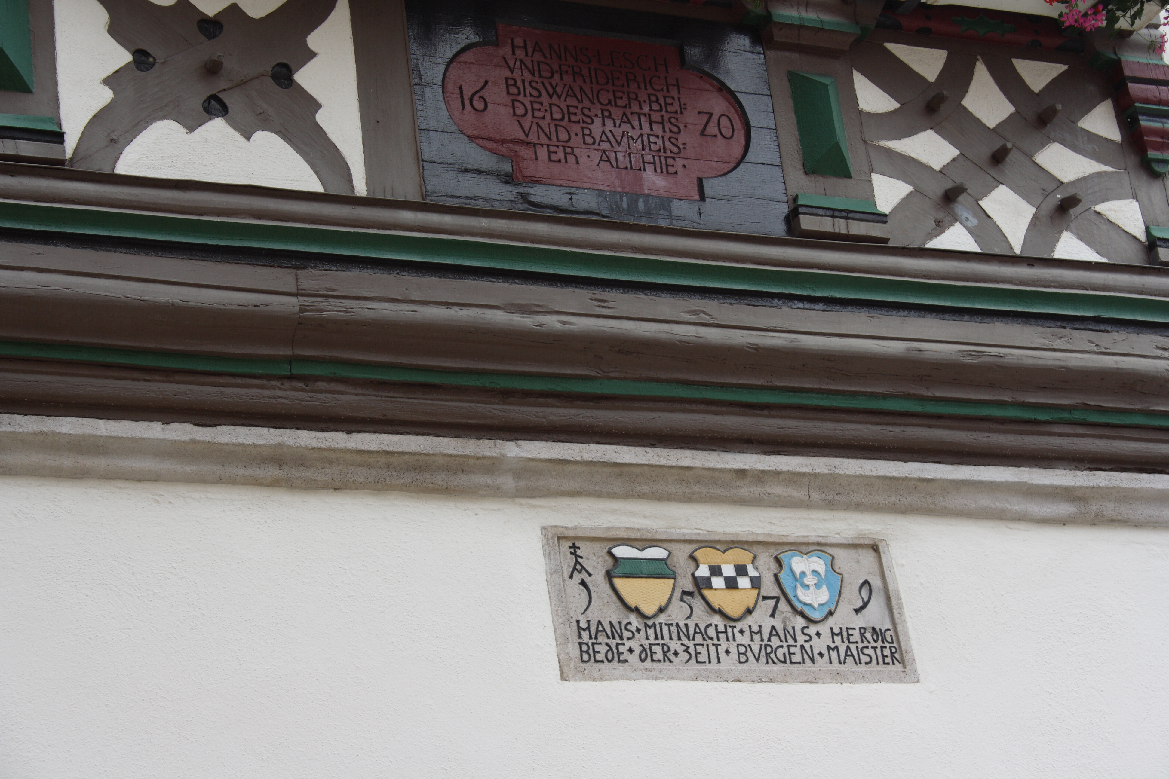 Rathaus in Grünsfeld im Main-Tauber-Kreis (Baden-Württemberg), Hauptstraße 12